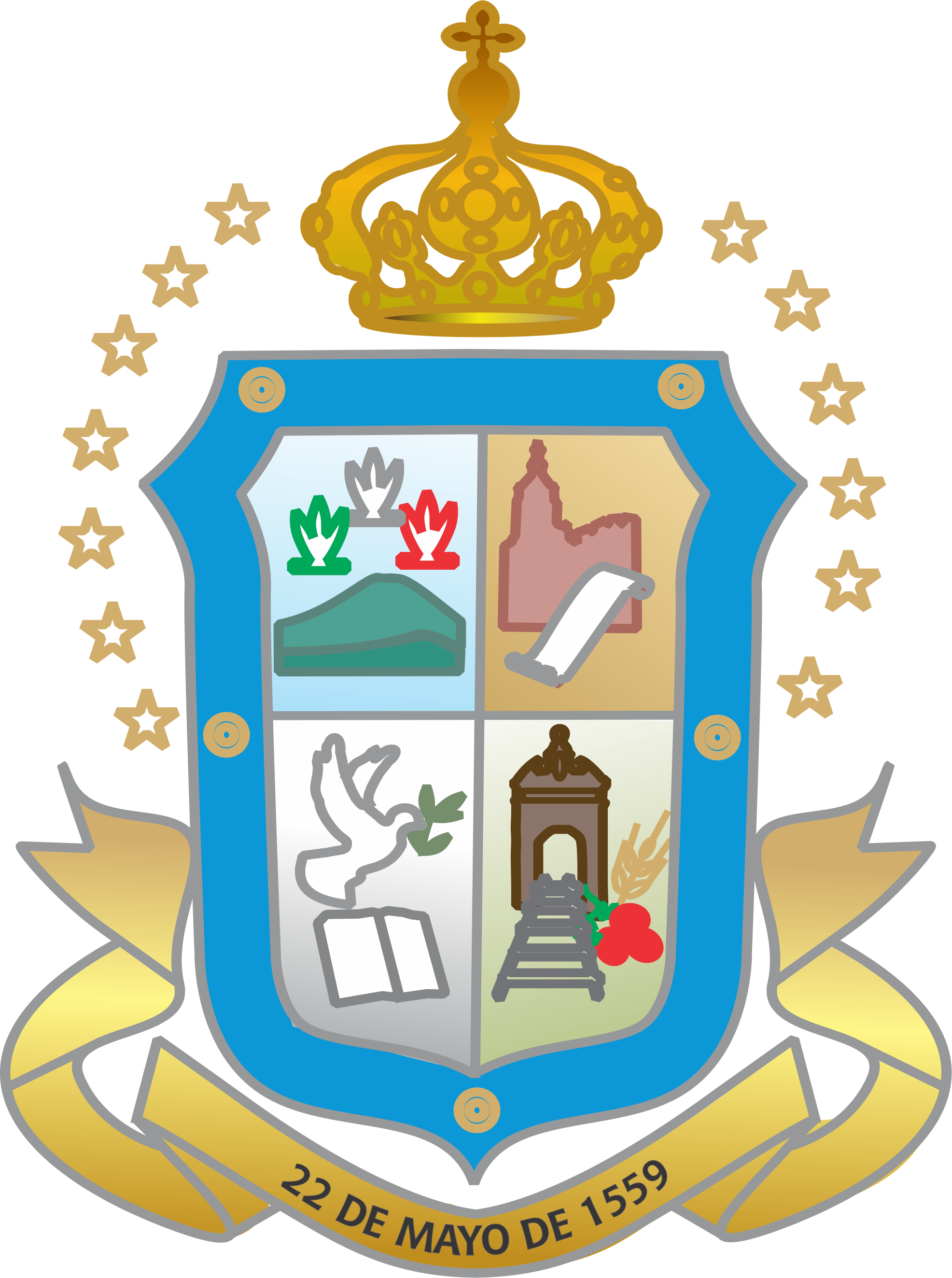 Escudo del municipio de Yurécuaro, Mihcoacán;México